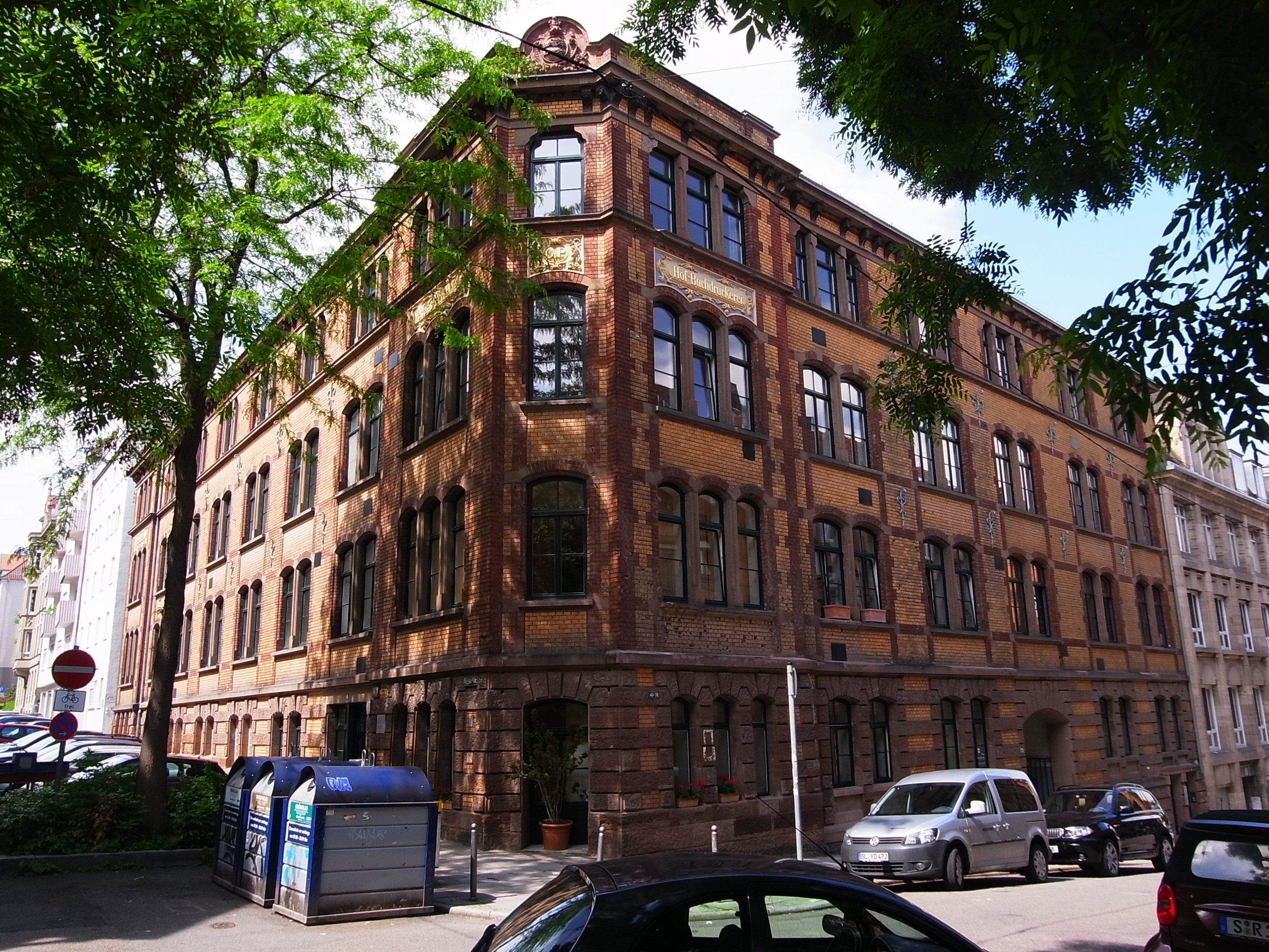 Der ehemalige Firmensitz der Hofbuchdruckerei Greiner & Pfeiffer (Stuttgart)